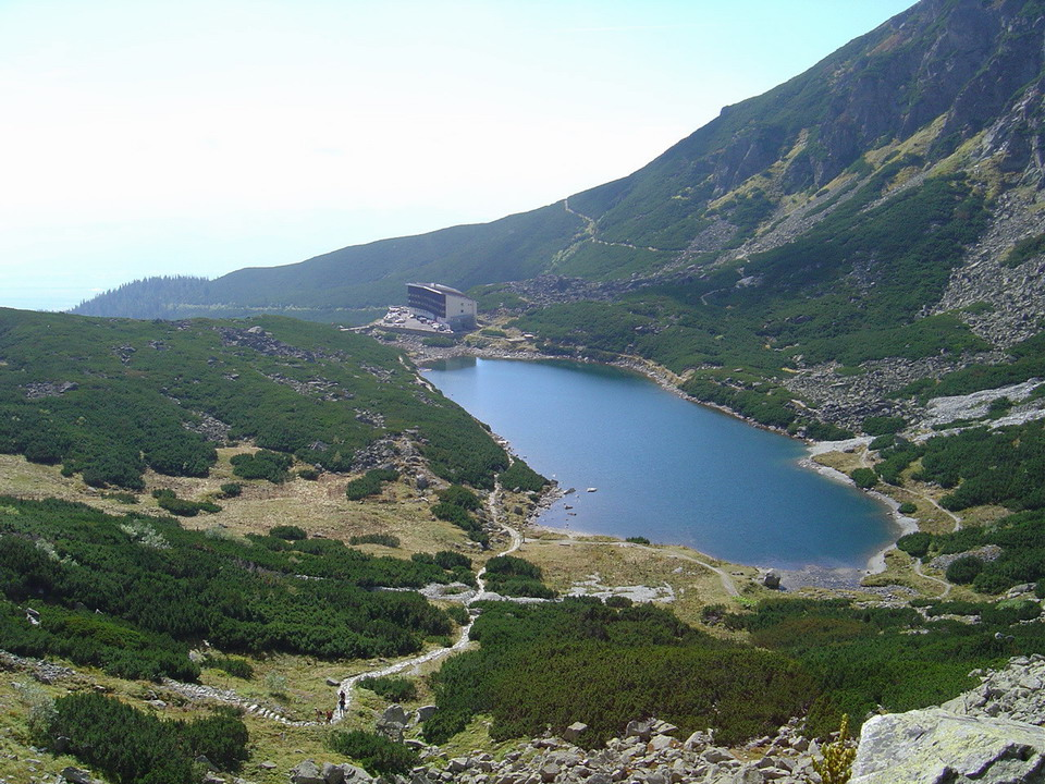 Velicke pleso from above Velicky vodopad